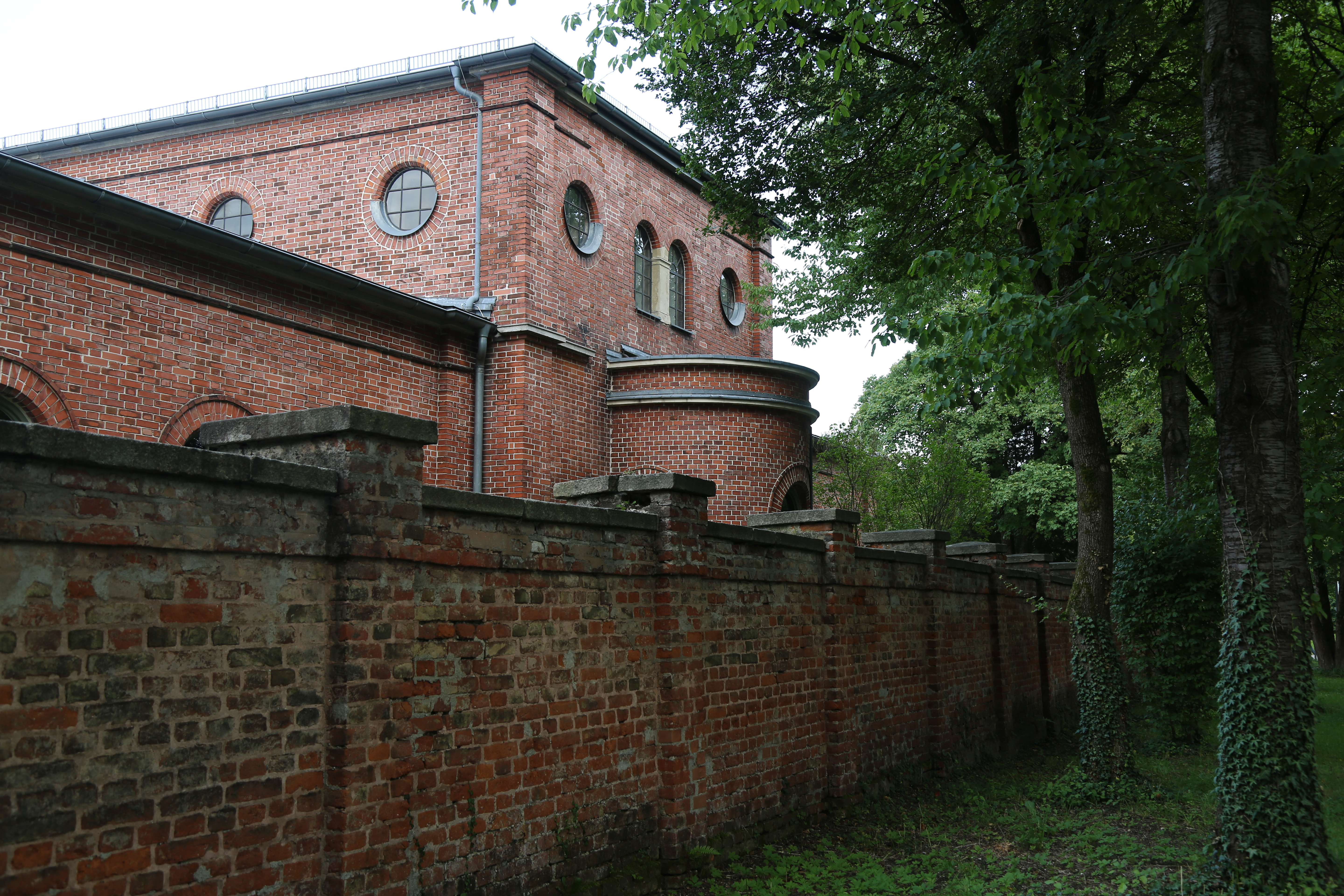 Der Alte Israelitische Friedhof von München liegt im Stadtteil Sendling und war von 1816 bis 1907 in Gebrauch.